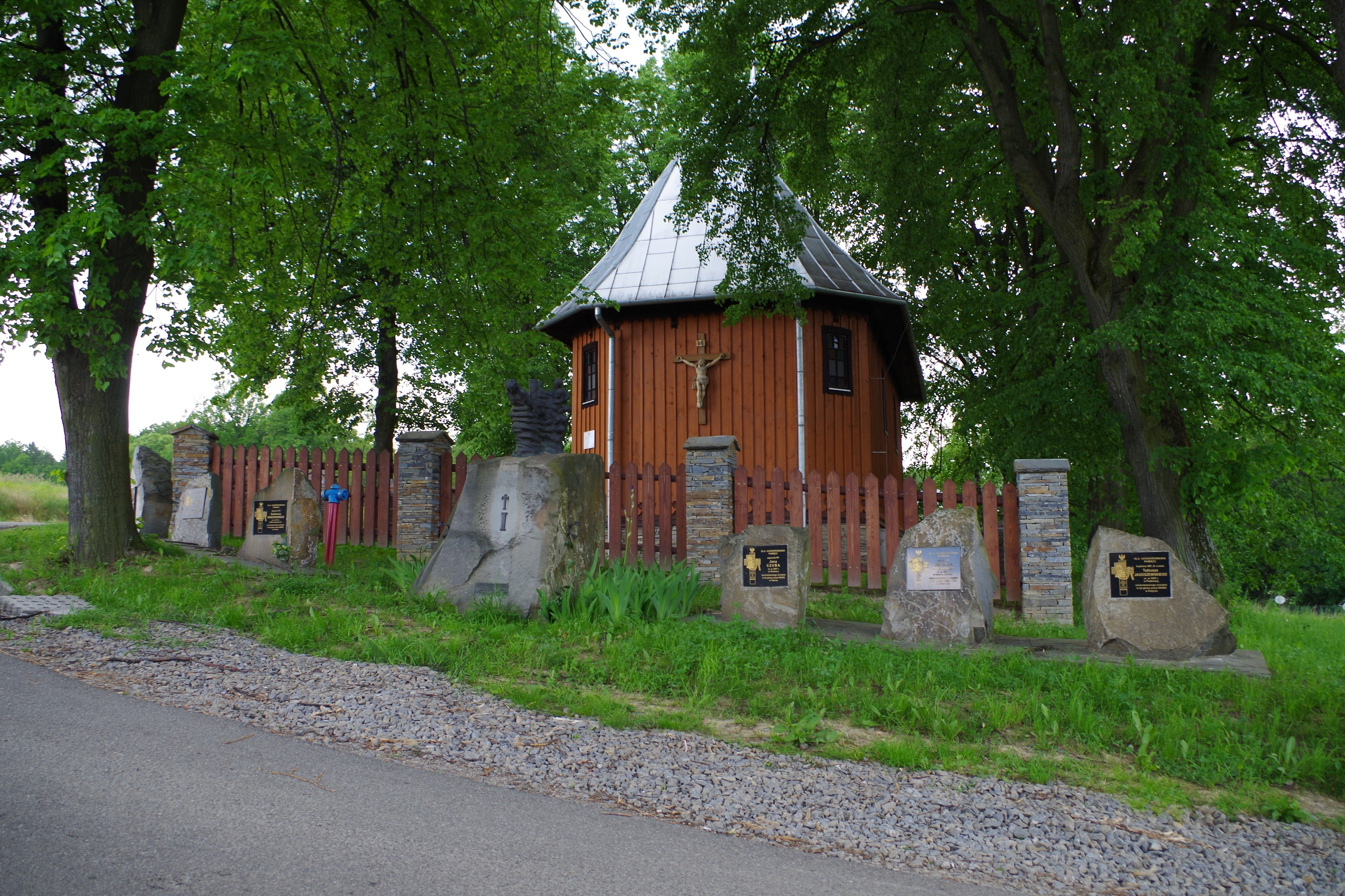 Kaplica dworska w Marcinkowicach